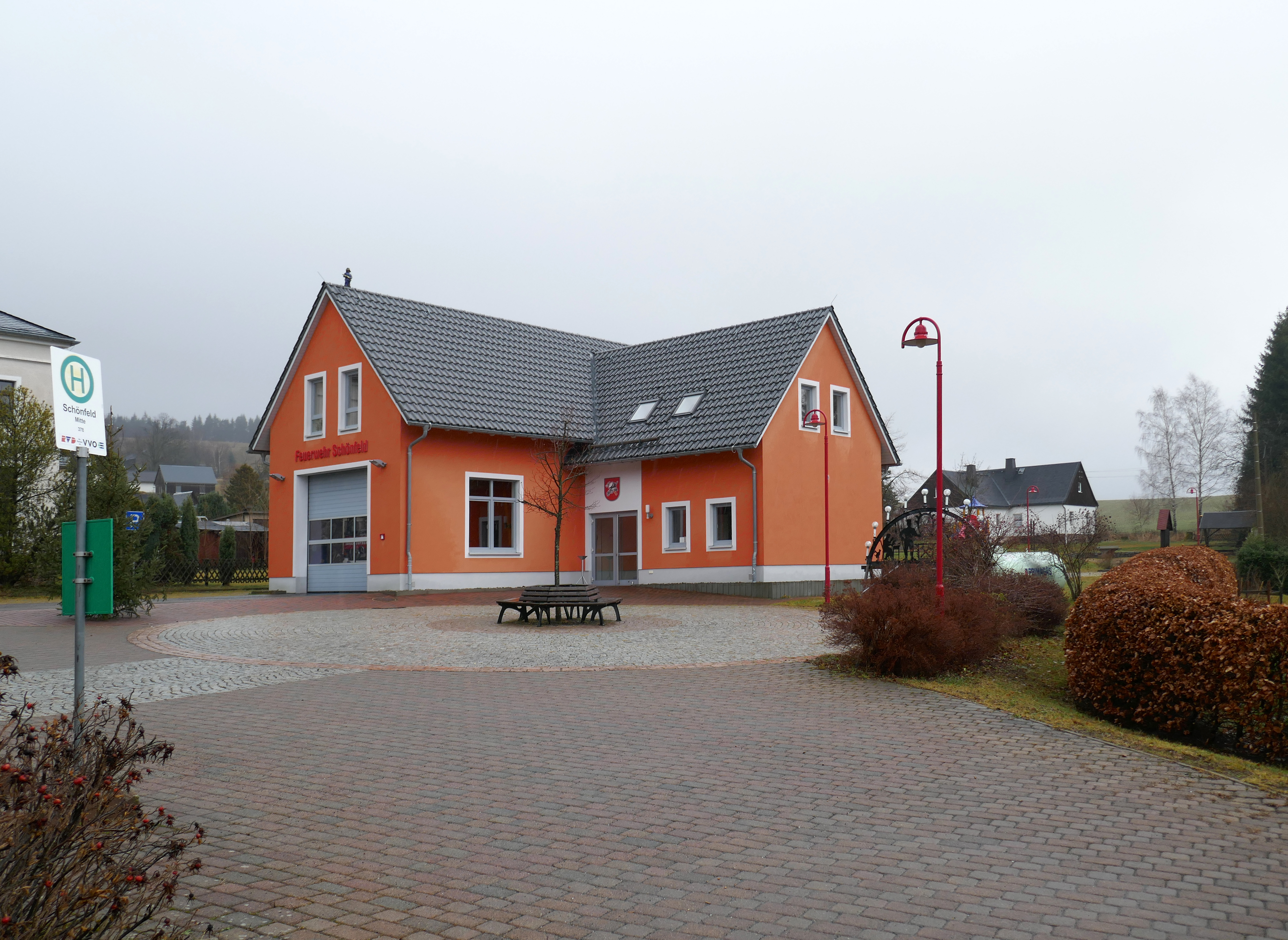 Ortsfeuerwehr Schönfeld (Dippoldiswalde) (Am Dorfplatz 54), Landkreis Sächsische Schweiz-Osterzgebirge - Sachsen.